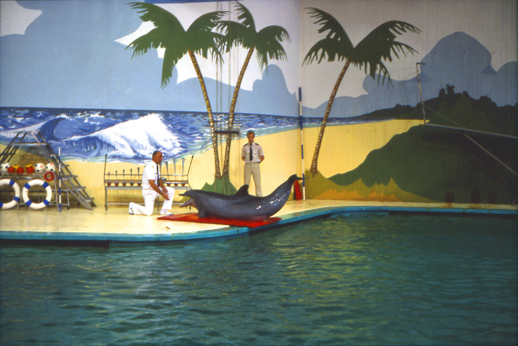 Vorführung von Großen Tümmlern in Hagenbeck’s Delfinarium